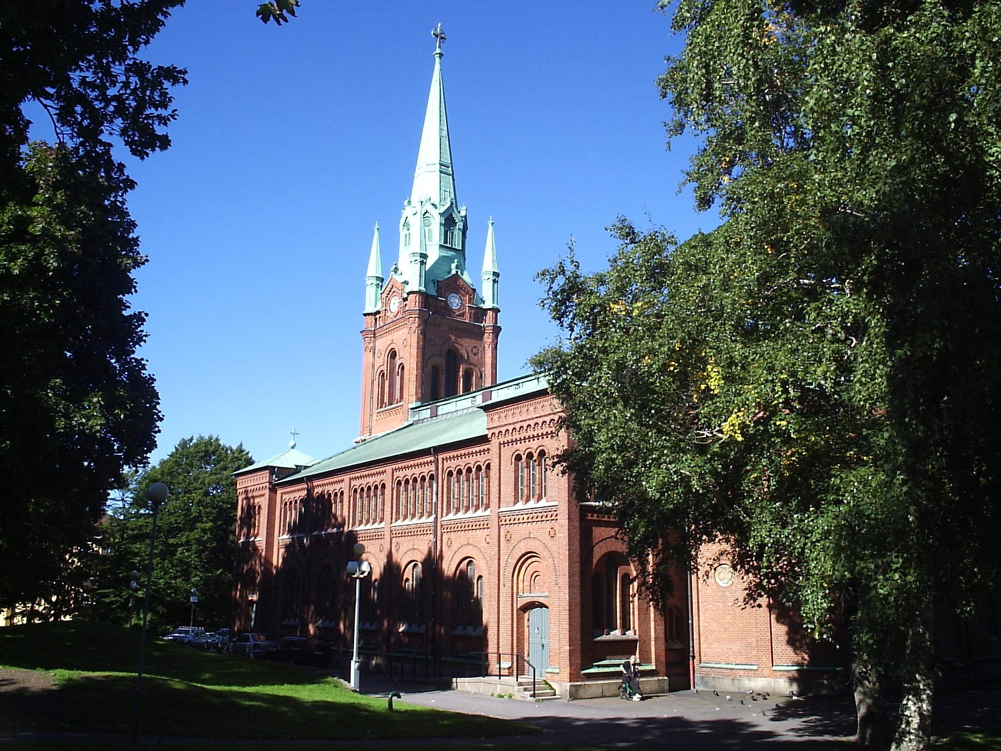 Sankt Pauli kyrka, Göteborg, den 11 september 2005. Fotograferad av Harri Blomberg.